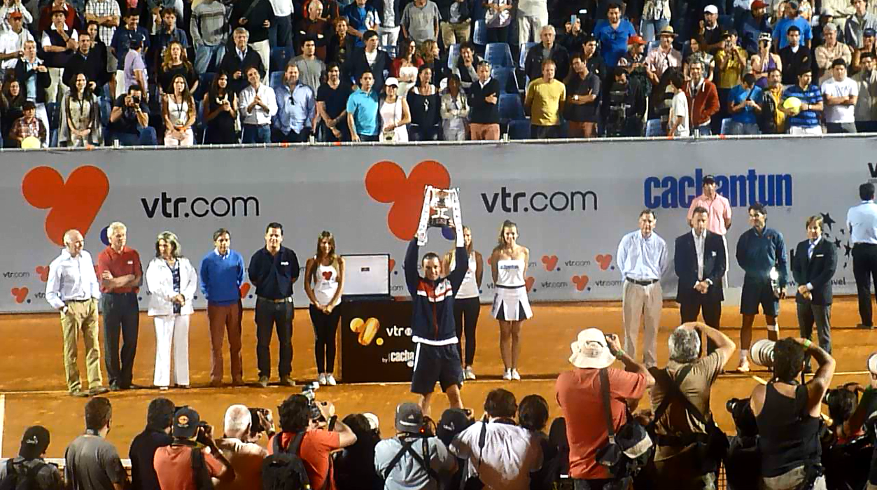 Horacio Zeballos (ARG) derrota a Rafael Nadal (ESP) en la final del torneo por 6-7, 7-6 y 6-4